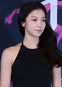 [TV텐] 5월 30일 영화 '악녀' 언론시사회 현장